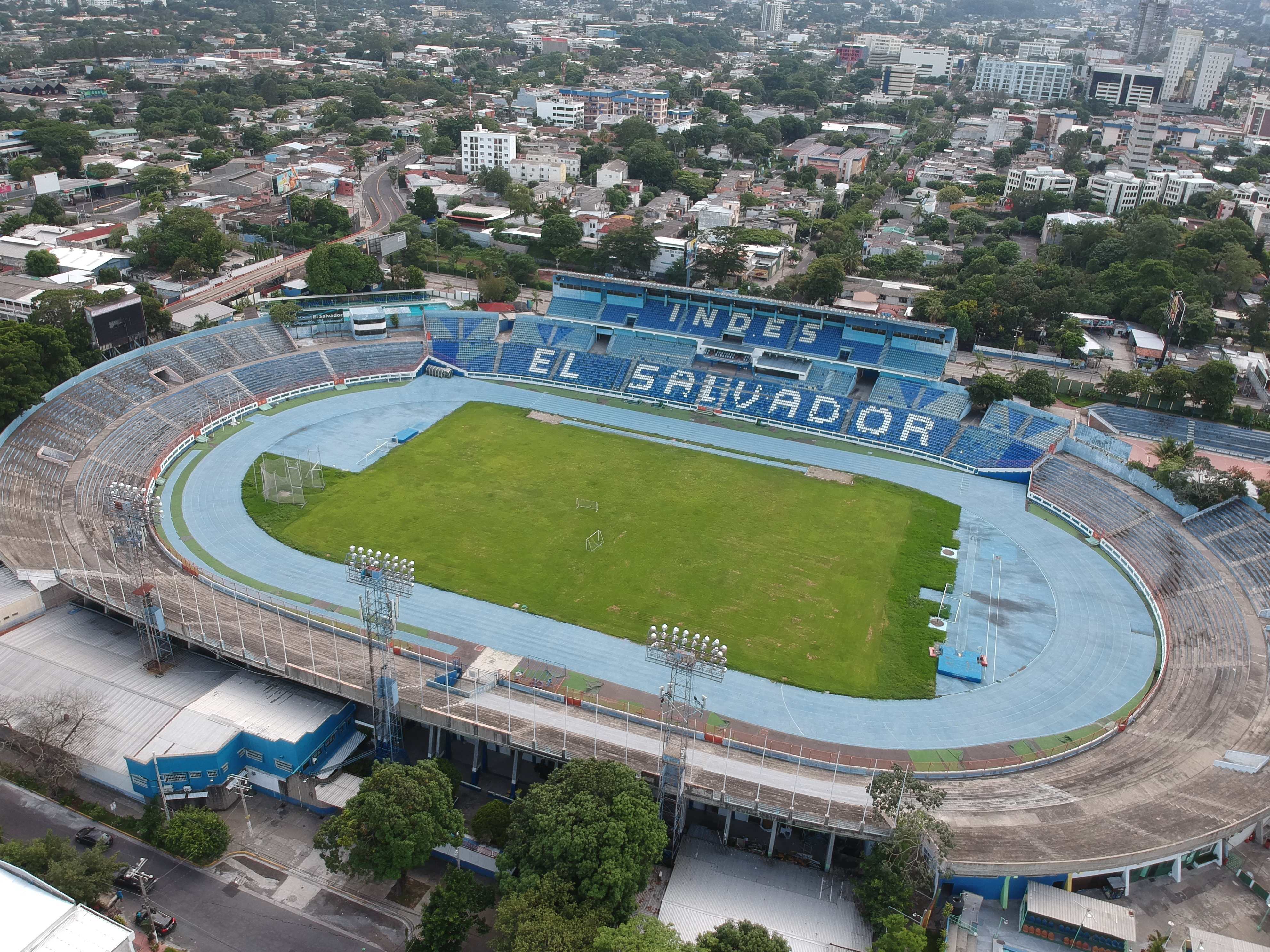 Vista aere del estadio